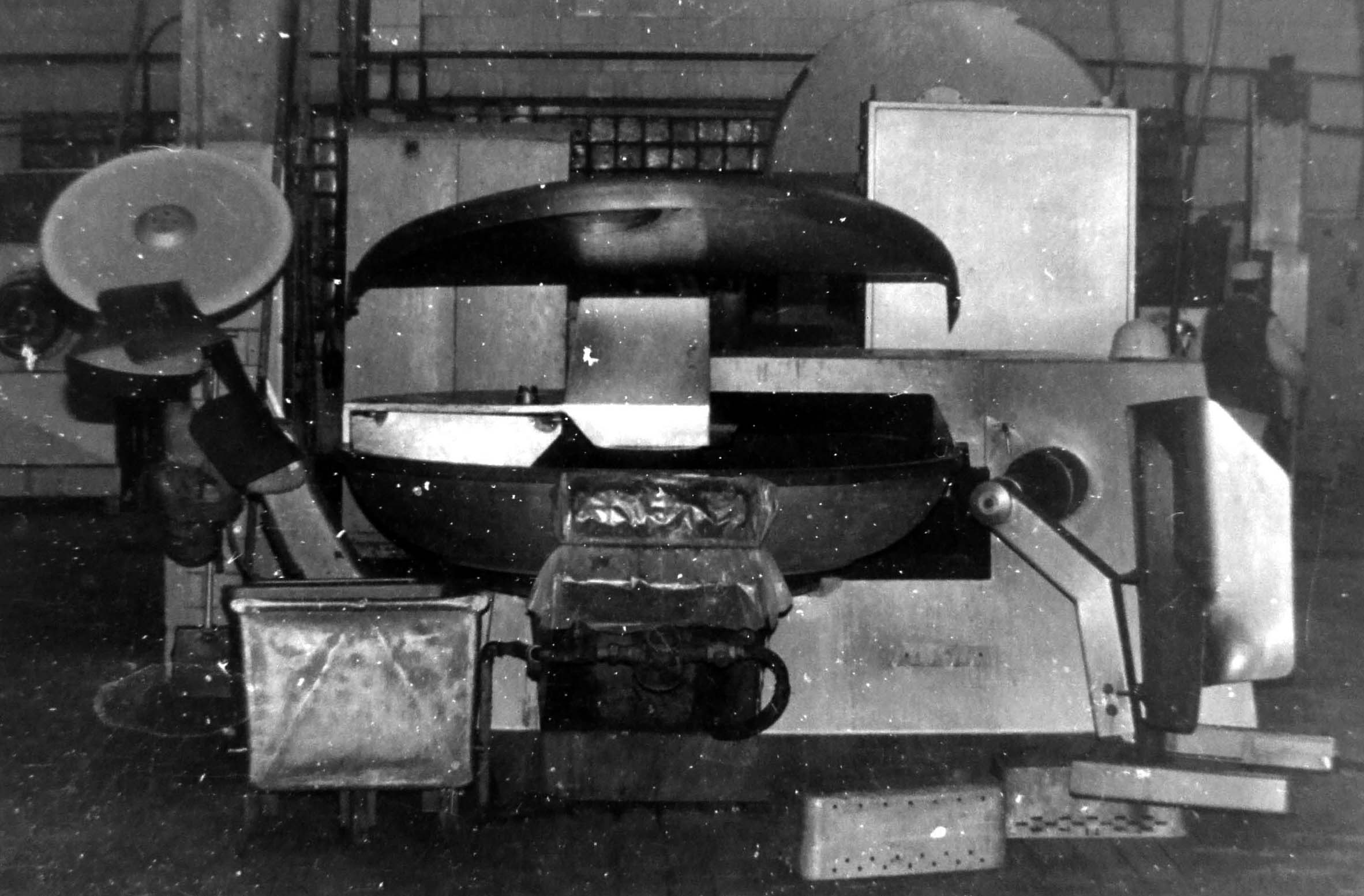 Kuter (maszyna) w Zakładach Mięsnych w Dąbrowie Górniczej 1986r.